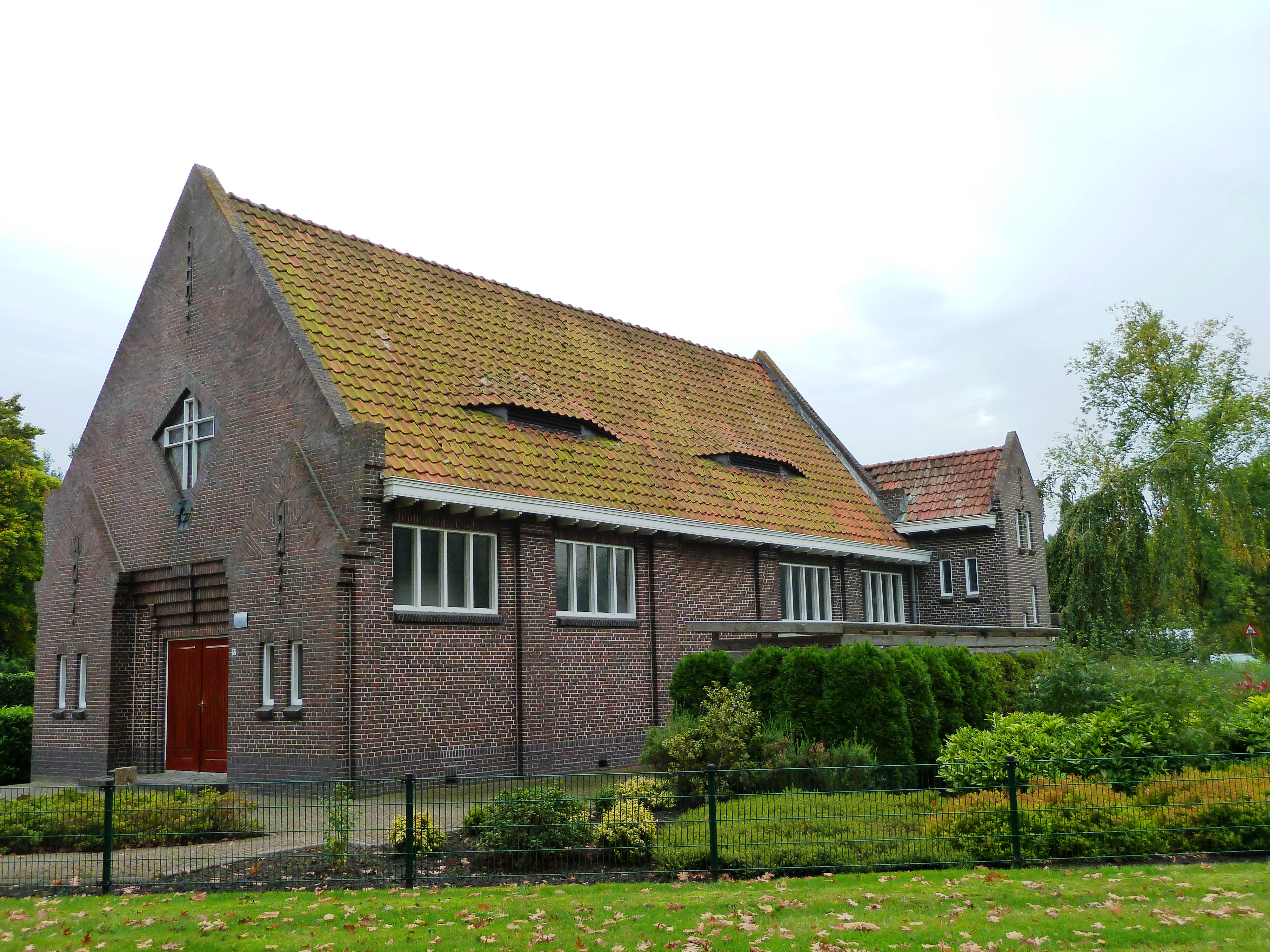 Katholiek-apostolische kerk van Scheemda. Gebouwd in 1918 in expressionistische stijl met invloeden van de Amsterdamse school.